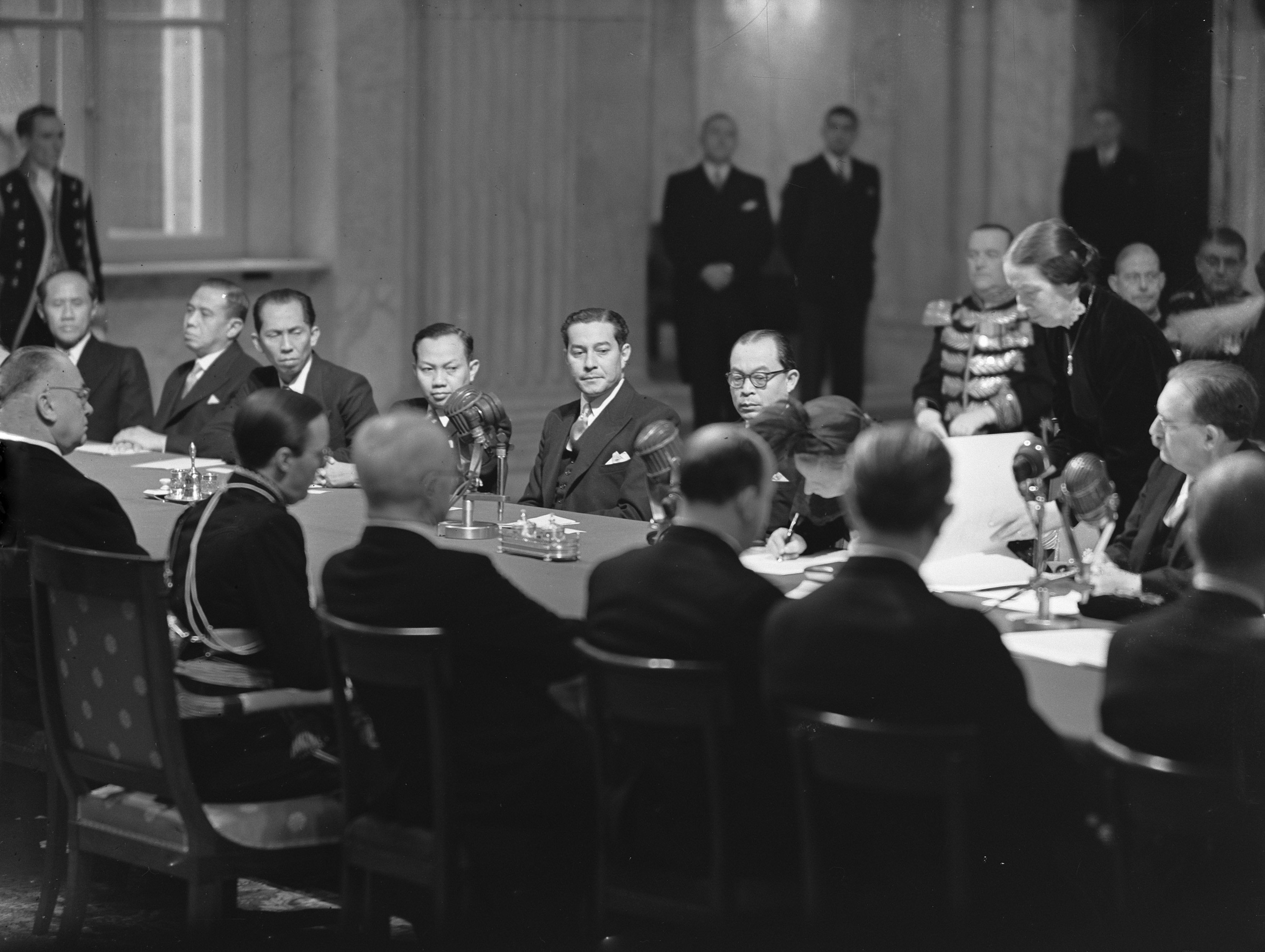 Collectie / Archief : Fotocollectie Anefo Reportage / Serie : [ onbekend ] Beschrijving : Soevereiniteitsoverdracht Indonesië. Koningin Juliana tekent de akte Annotatie : Staand mej. Tellegen, directeur Kabinet van de Koningin Datum : 27 december 1949 Locatie : Amsterdam Trefwoorden : internationale akkoorden, plechtigheden Persoonsnaam : Drees, Willem (sr.), Hatta, Mohammad, Juliana (prinses Nederland) Fotograaf : Bilsen, Joop van / Anefo, [onbekend] Auteursrechthebbende : Nationaal Archief Materiaalsoort : Glasnegatief Nummer archiefinventaris : bekijk toegang 2.24.01.09 Bestanddeelnummer : 934-5295